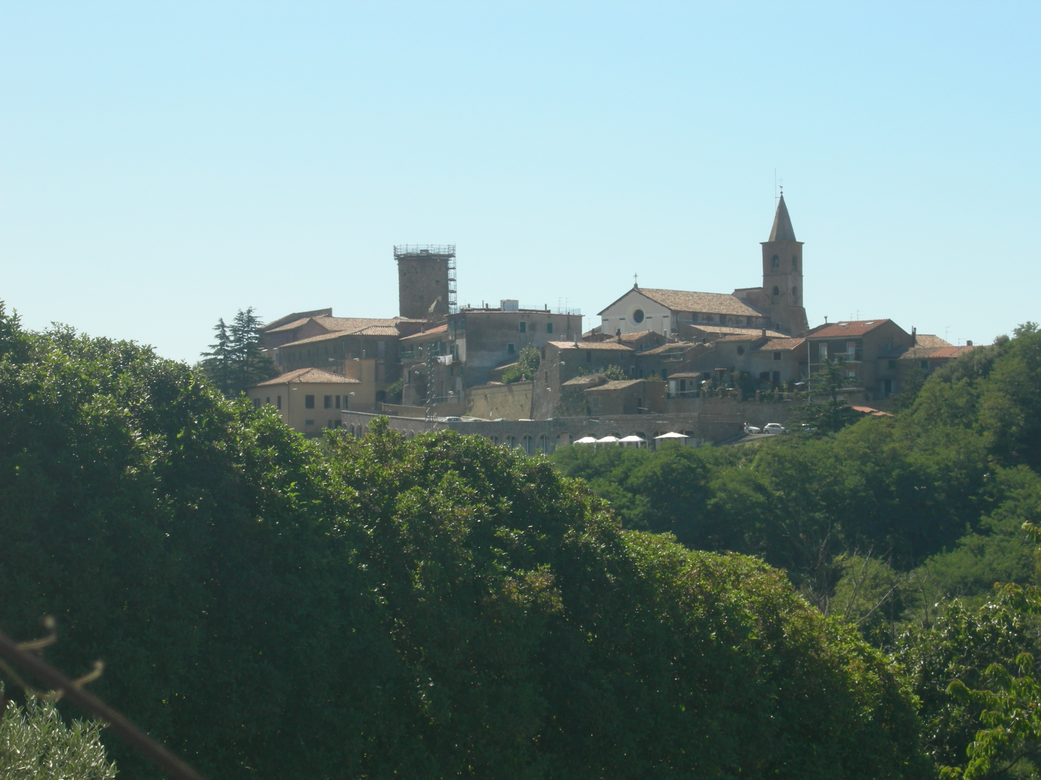 La Rocca di Valentano (Vista da casa di M7)